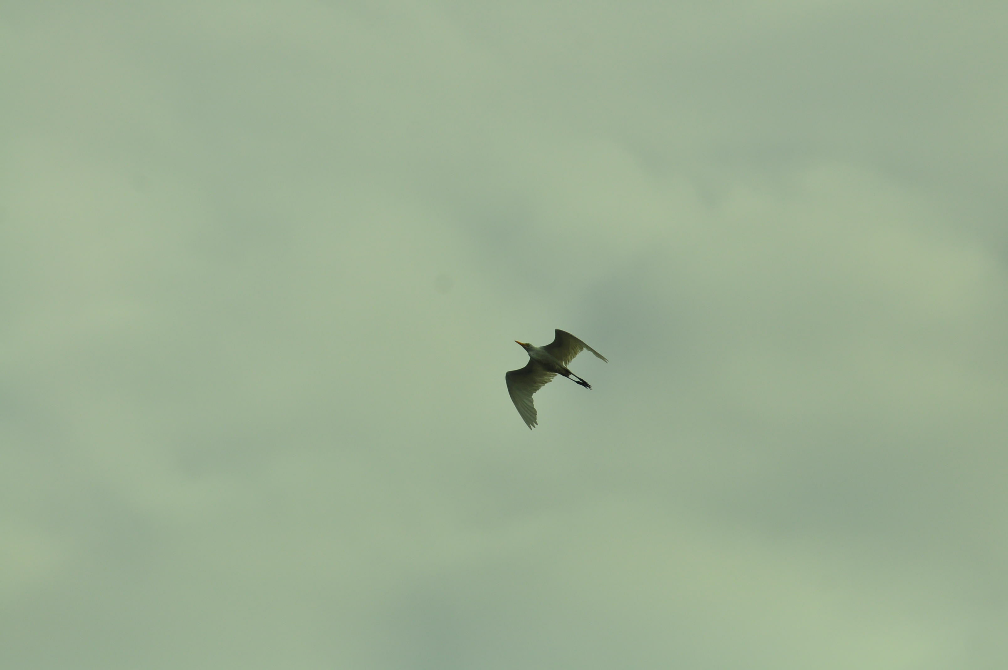 Above laut dendang